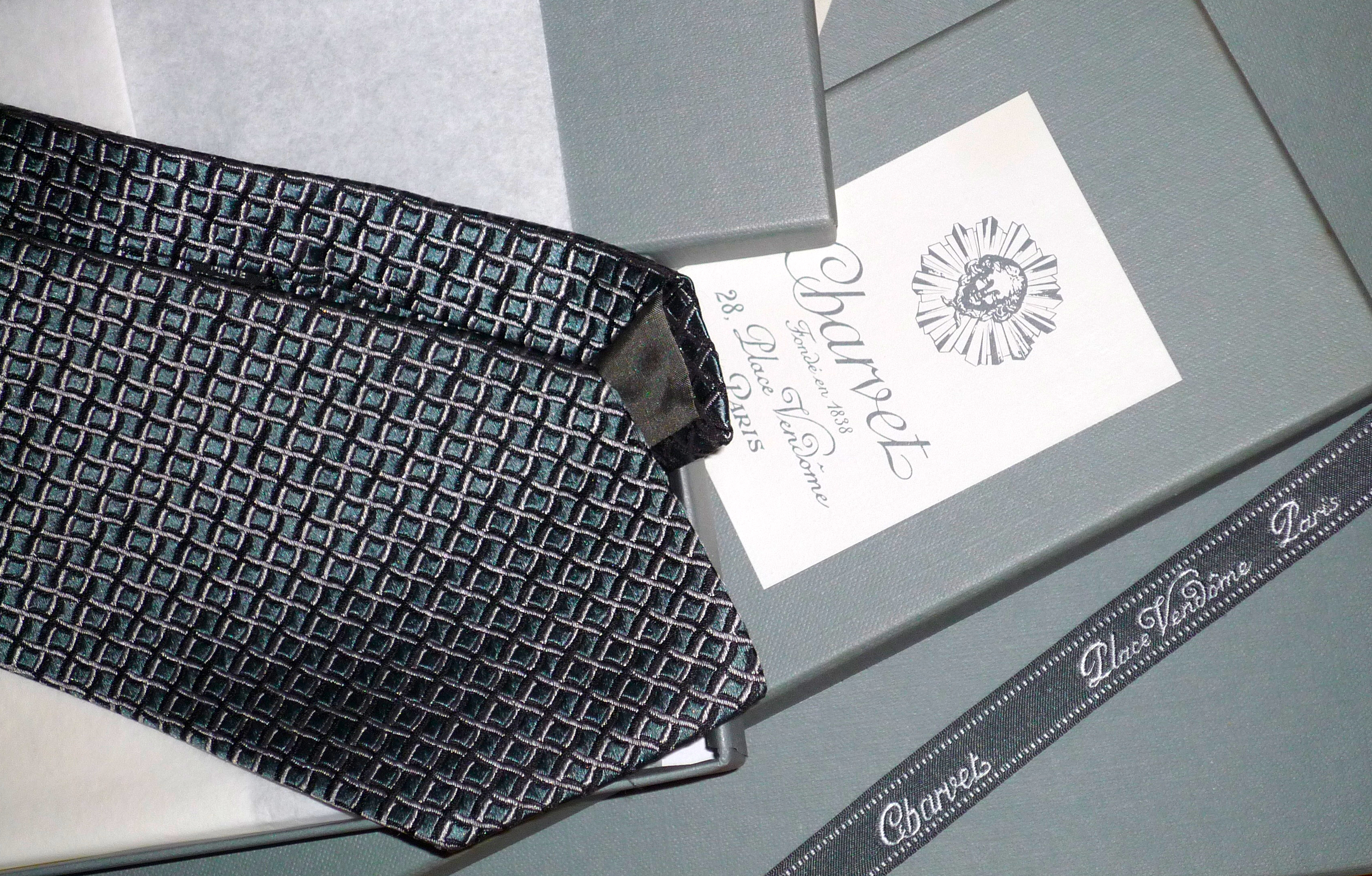 Charvet Place Vendôme cravate en soie